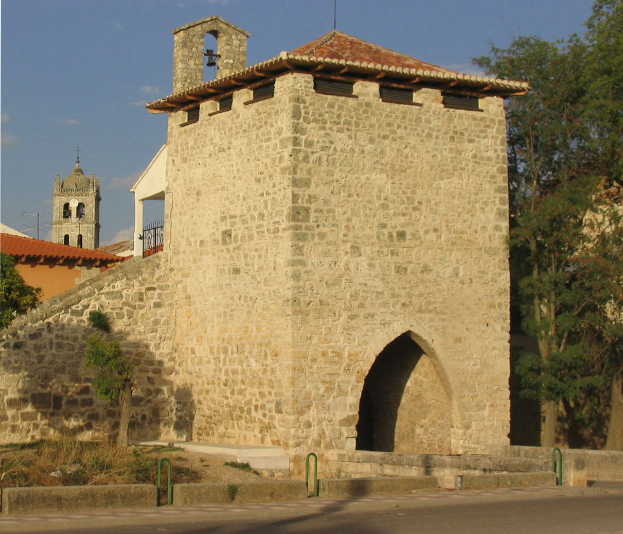 Puerta de acceso a la villa de Dueñas